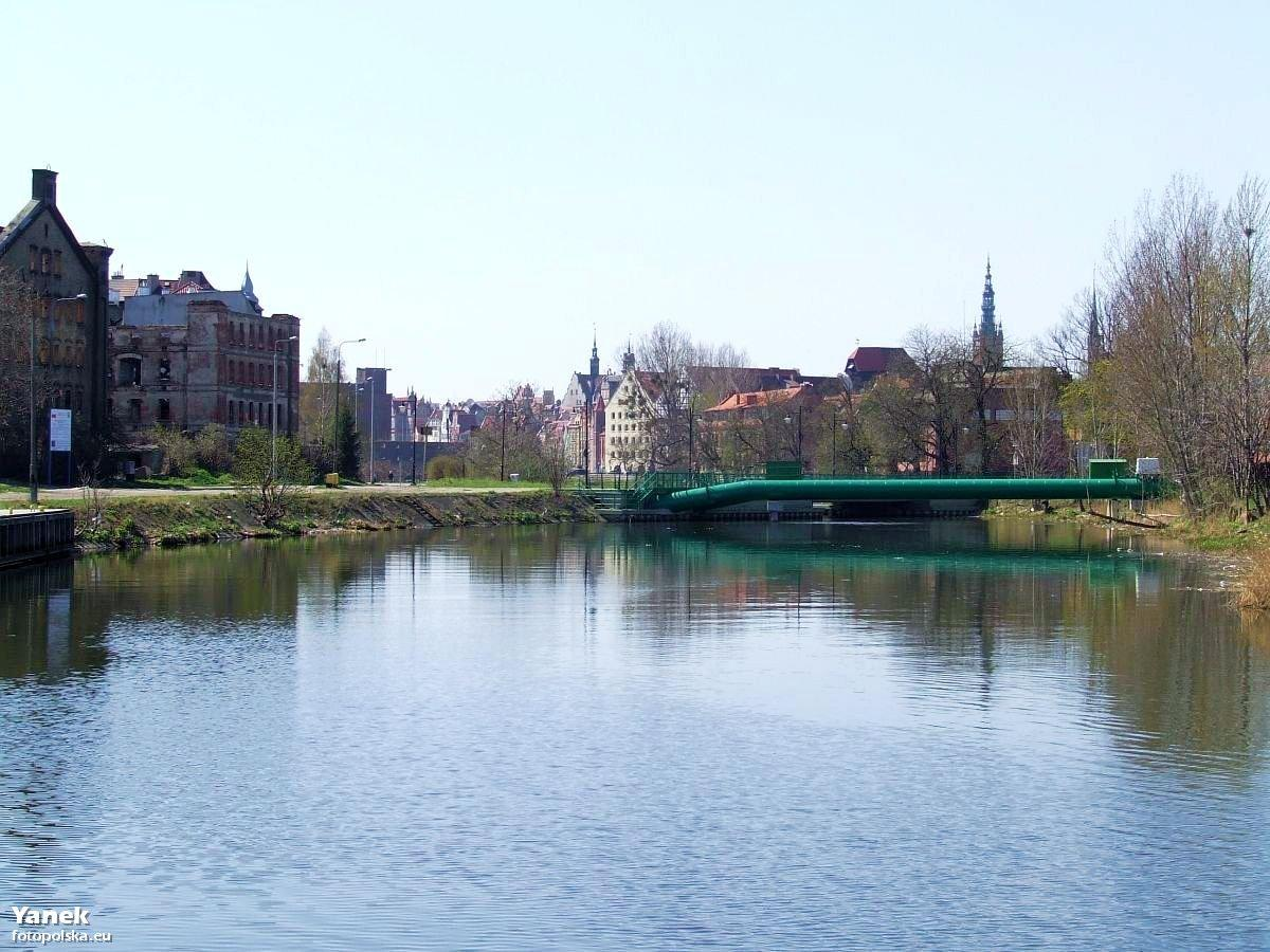 Widok Kanału Na Stępce z kierunku ujścia do Motławy. Po lewej ruiny zespołu dawnej rzeźni. Za zieloną rurą most d. kolejowy, którym dostarczano węgiel do elektrowni na Ołowiance.